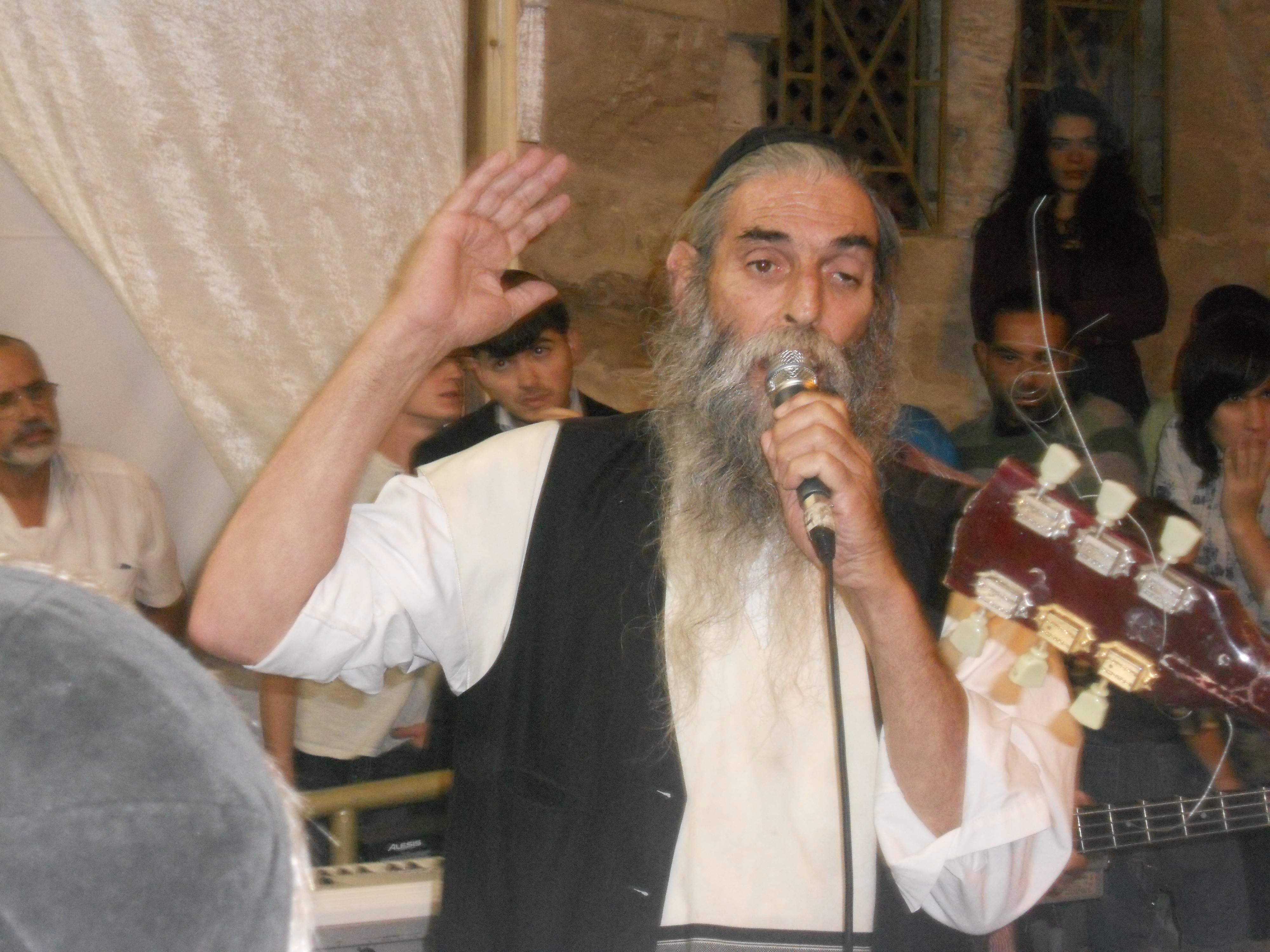 דב שורין בקבר דוד בהר ציון בירושלים בשמחת בית השואבה